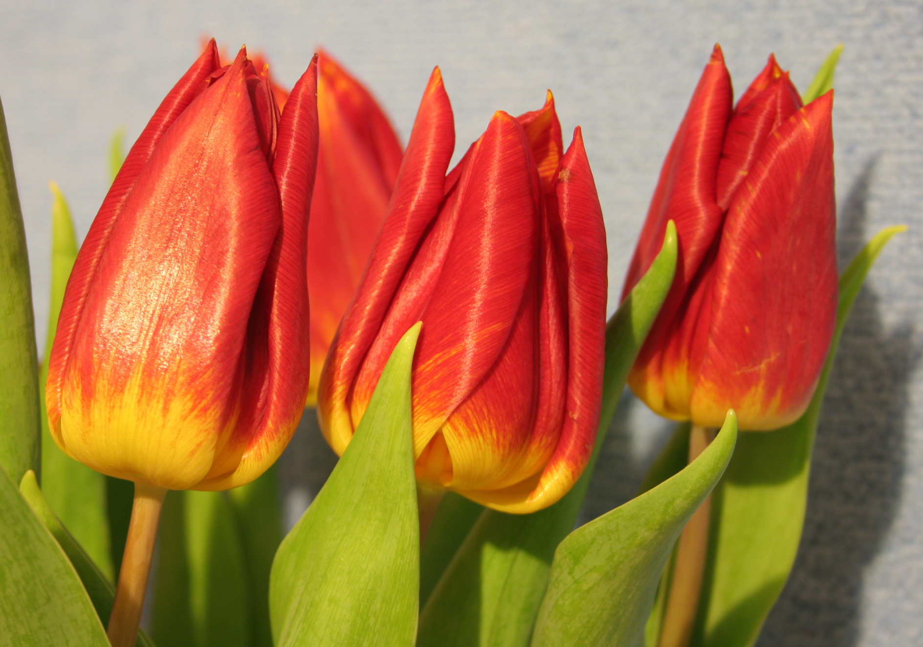 Rote Tulpen